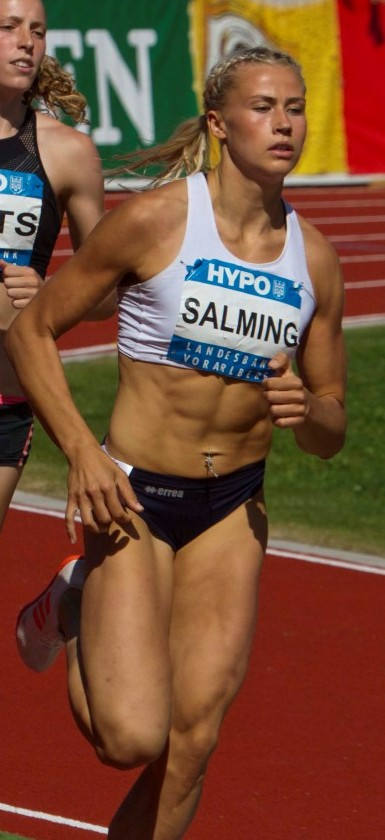 438 vidts 800m